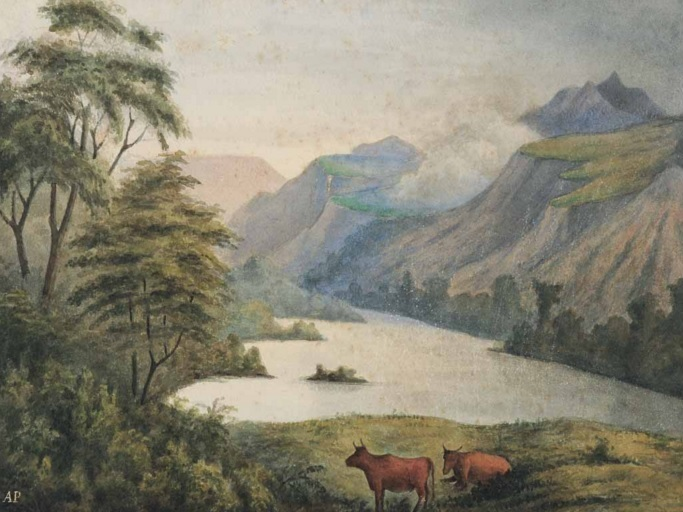 Pedro José Amado Pissis